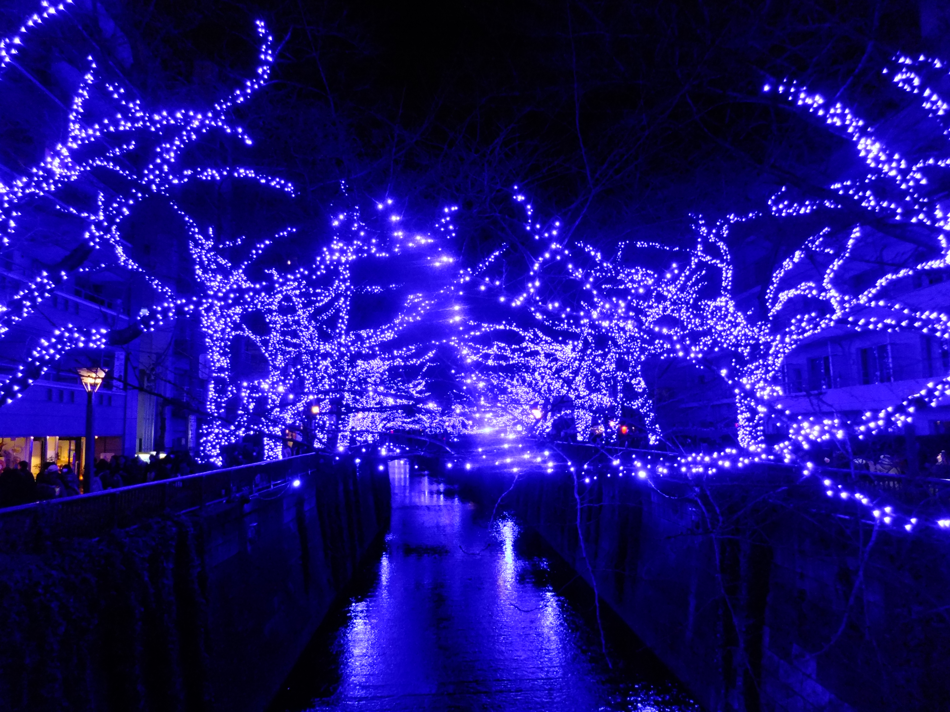 目黒川イルミネーション「青の洞窟 2014」